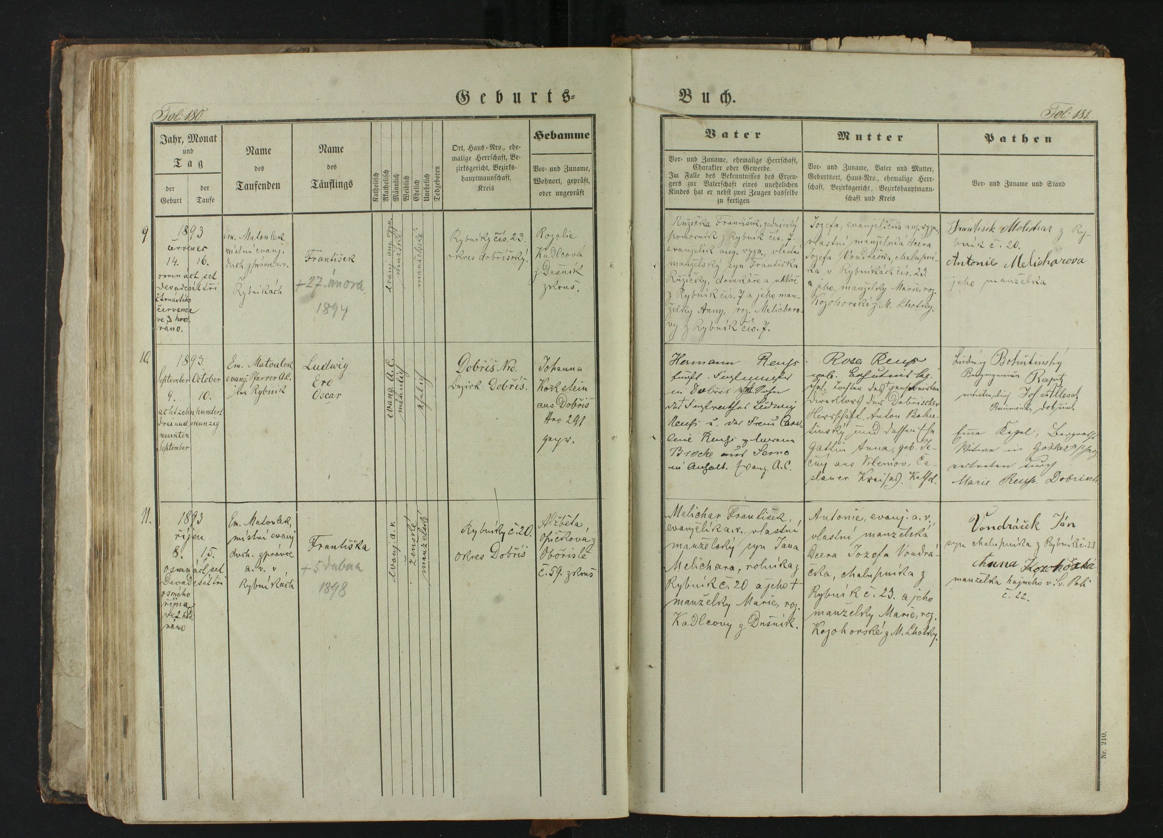 Stránka 181 matriční knihy Rybníky-ev 01. SOA Praha